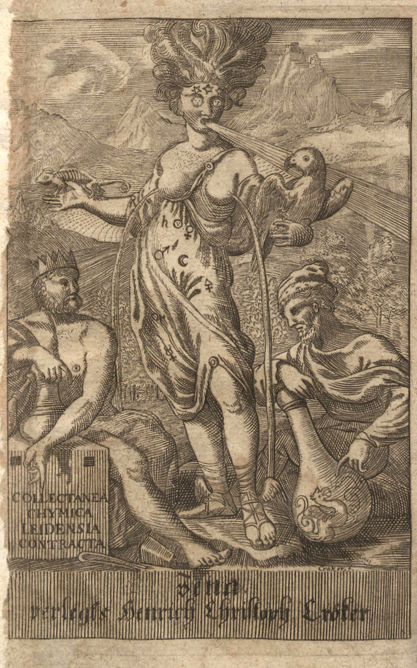 Frontis de Collectanea chymica Leidensis... de Christopher Love Morley y Theodorus Muykens, Leiden, 1693. Grabado firmado por Joseph Mulder con la alegoría de la Alquimia en pie, en el centro, entre el rey que representa el Azufre y el filósofo, con el recipiente donde se enfrentan los principios fijo y volátil (Klossowski de Rola, Stanislas, El Juego Áureo. 533 grabados alquímicos del siglo XVII, Madrid, Siruela, 1988, pp. 307 y 311)